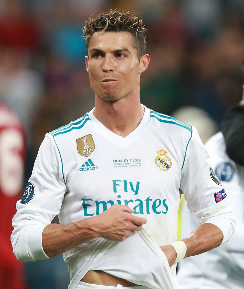 Финал ЛЧ в Киеве: 13-й кубок «Реала» и слёзы «Ливерпуля»